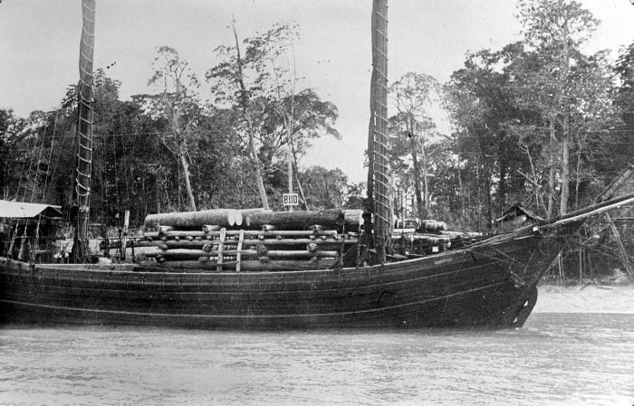 Repronegatief. Een Chinese Tongkang voor een laadsteiger op het eiland Mendol bij Bengkalis, Sumatra's Oostkust